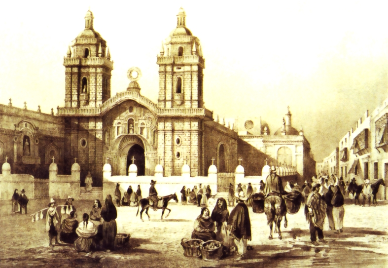 Una vista de la ciudad de Lima a principios de la República (años 1830)